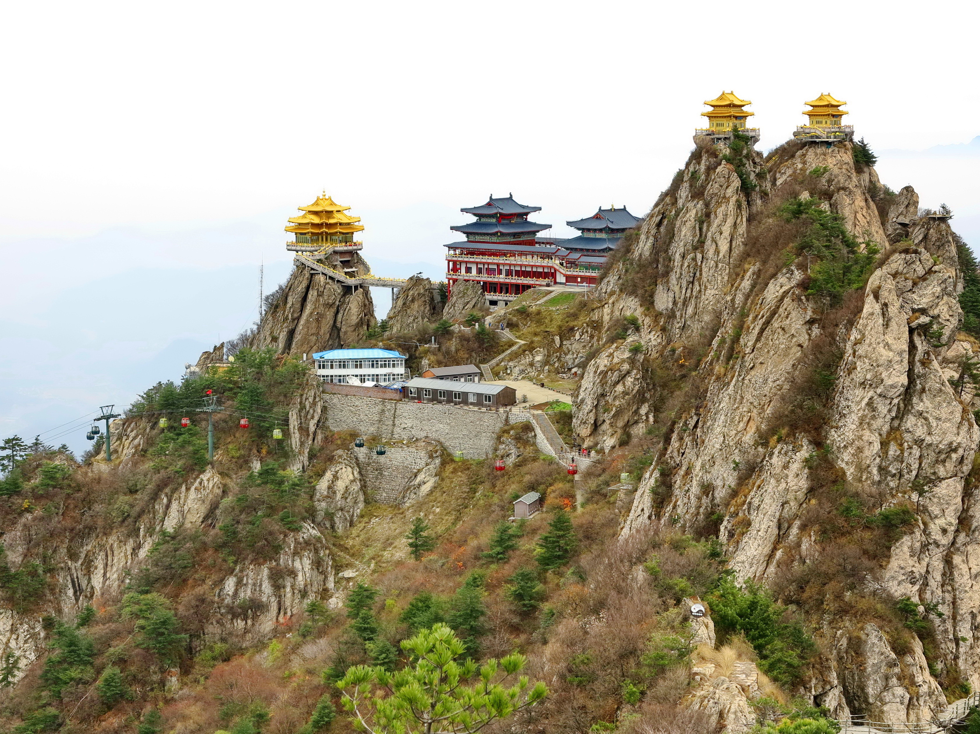 河南 老君山 老君庙金殿